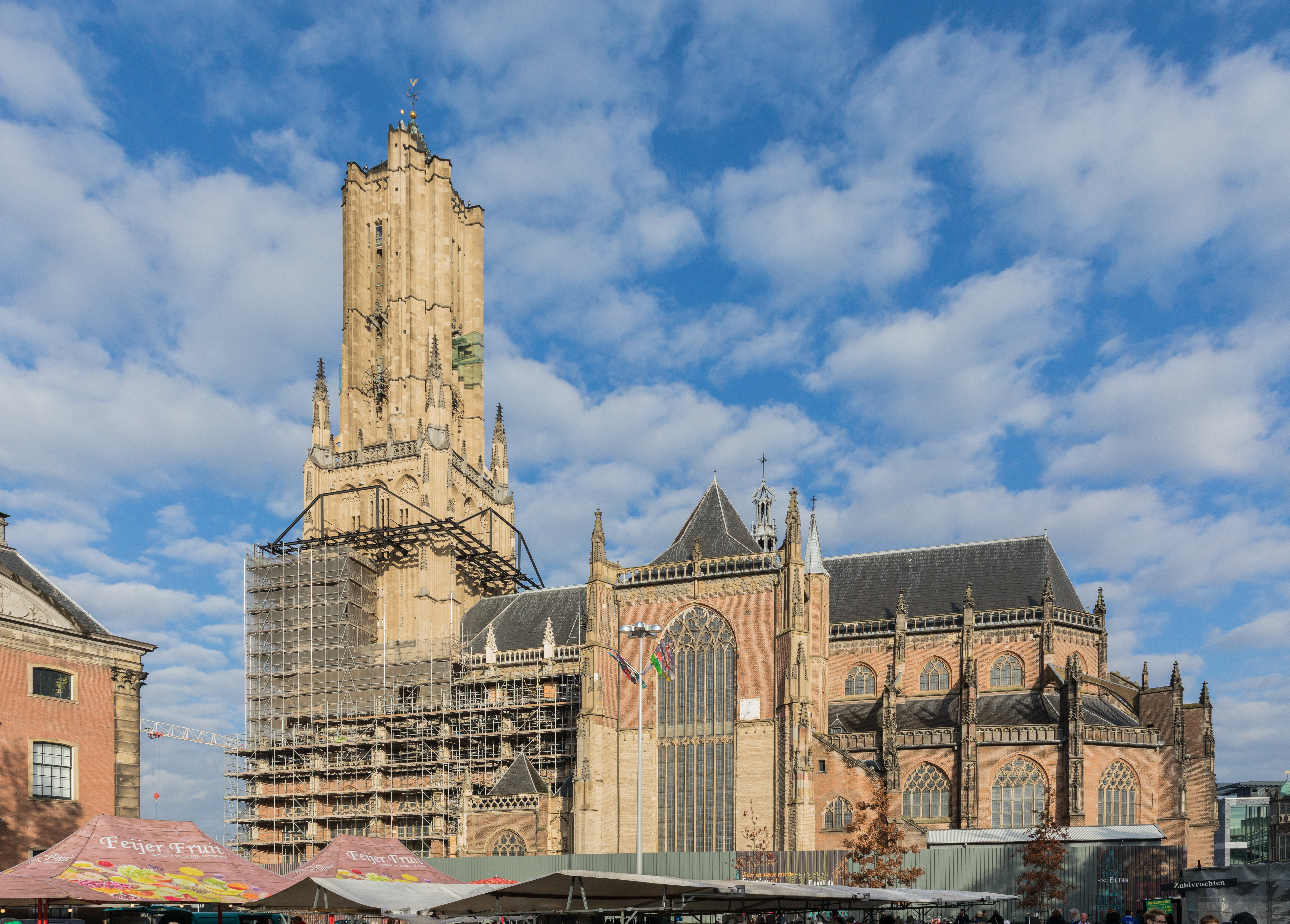 Sint-Eusebiuskerk, Arnhem Kerk